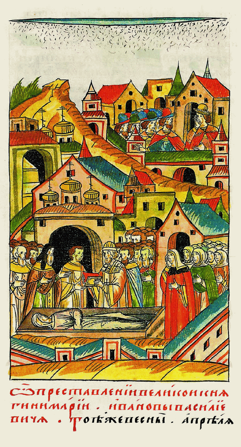 Той же весной 14 апреля ро- дился у князя Василия Ивановича Рязанского сын Иван в городе Москве [в 22 день, в среду четвертой недели по Пасхе, со среды на четверг в 5 часов ночи скончалась в городе Москве благоверная и христолюбивая, добрая и смирен- ная великая княгиня Мария, дочь великого князя Тверского Бо- риса Александровича. Митрополит Филипп пел над ней обычные песни, и положили ее в монастыре в церкви святого Вознесения, над бывшей ее све- кровью, великой кня- гиней Марией; князь же великий Иван тогда был в Коломне. Той же весной пятого мая снег пал в полголени и лежал три дня; и на четвертый день рас- таял к вечеру. А в ме- сяце июне, второго, мороз был.]